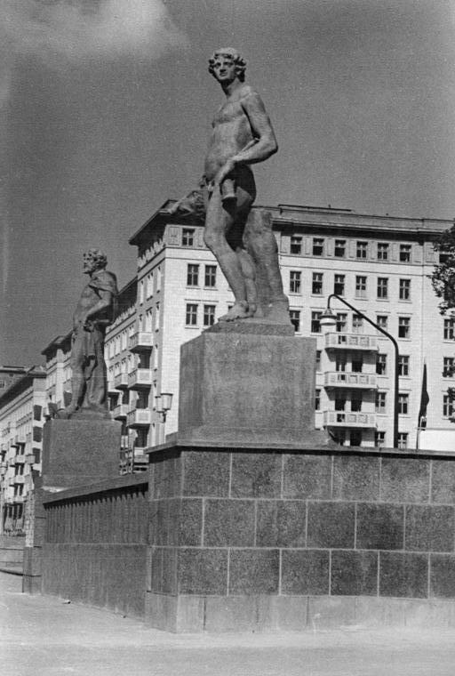 Zentralbild Weiß 27.4.1953 Die erste sozialistische Straße Berlins Stalinallee. Block B-Nord im Hintergrund, Statuen vor der Deutschen Sporthalle.